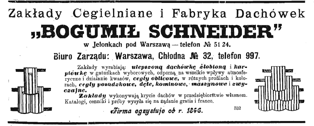 Ogłoszenie na temat Fabryki Schneidera w Przeglądzie Technicznym, 3 października 1912 r.